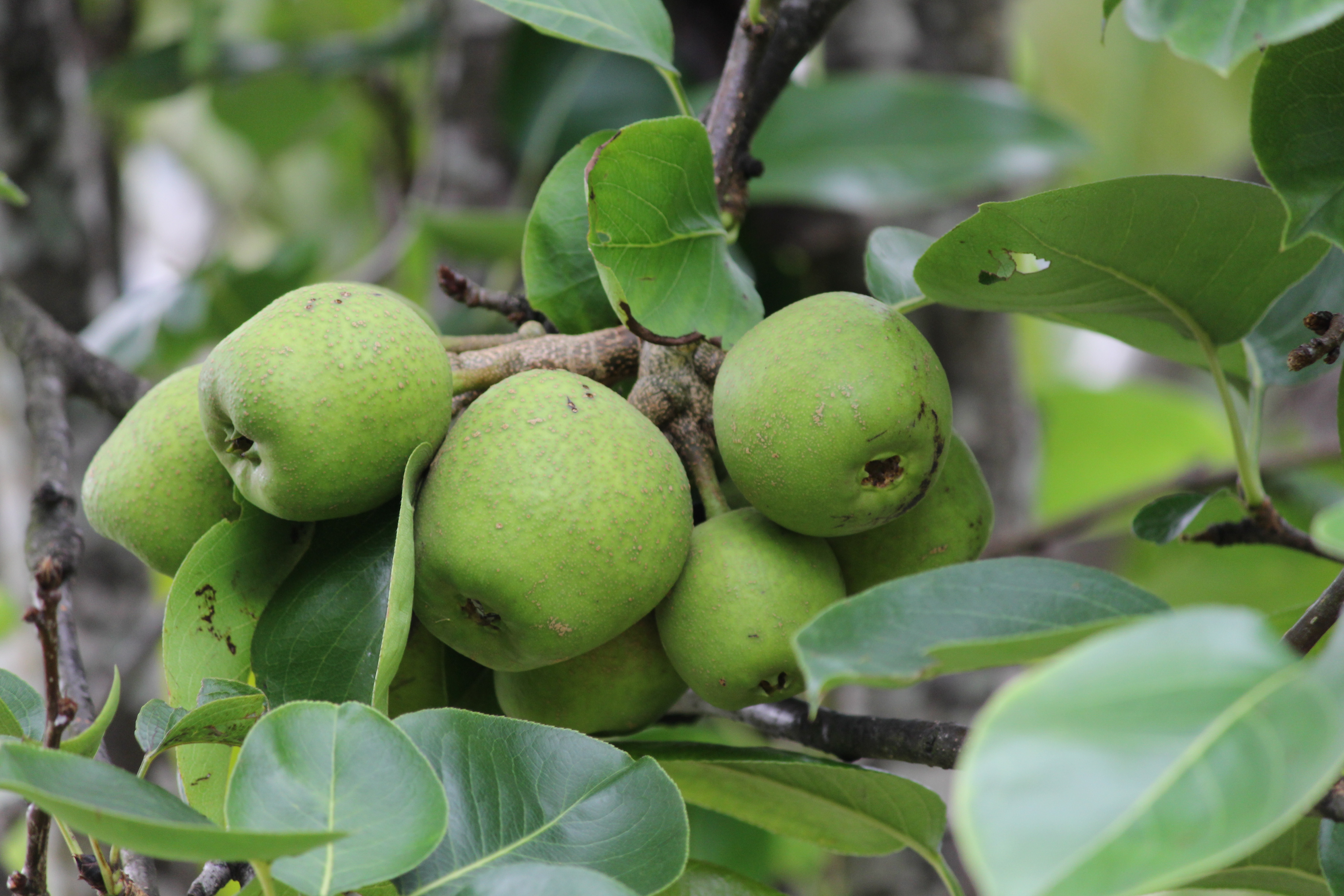 കാന്തല്ലൂരിലെ സബര്‍ജില്‍ കൃഷിയിടത്തില്‍നിന്നും പകര്‍ത്തിയത്